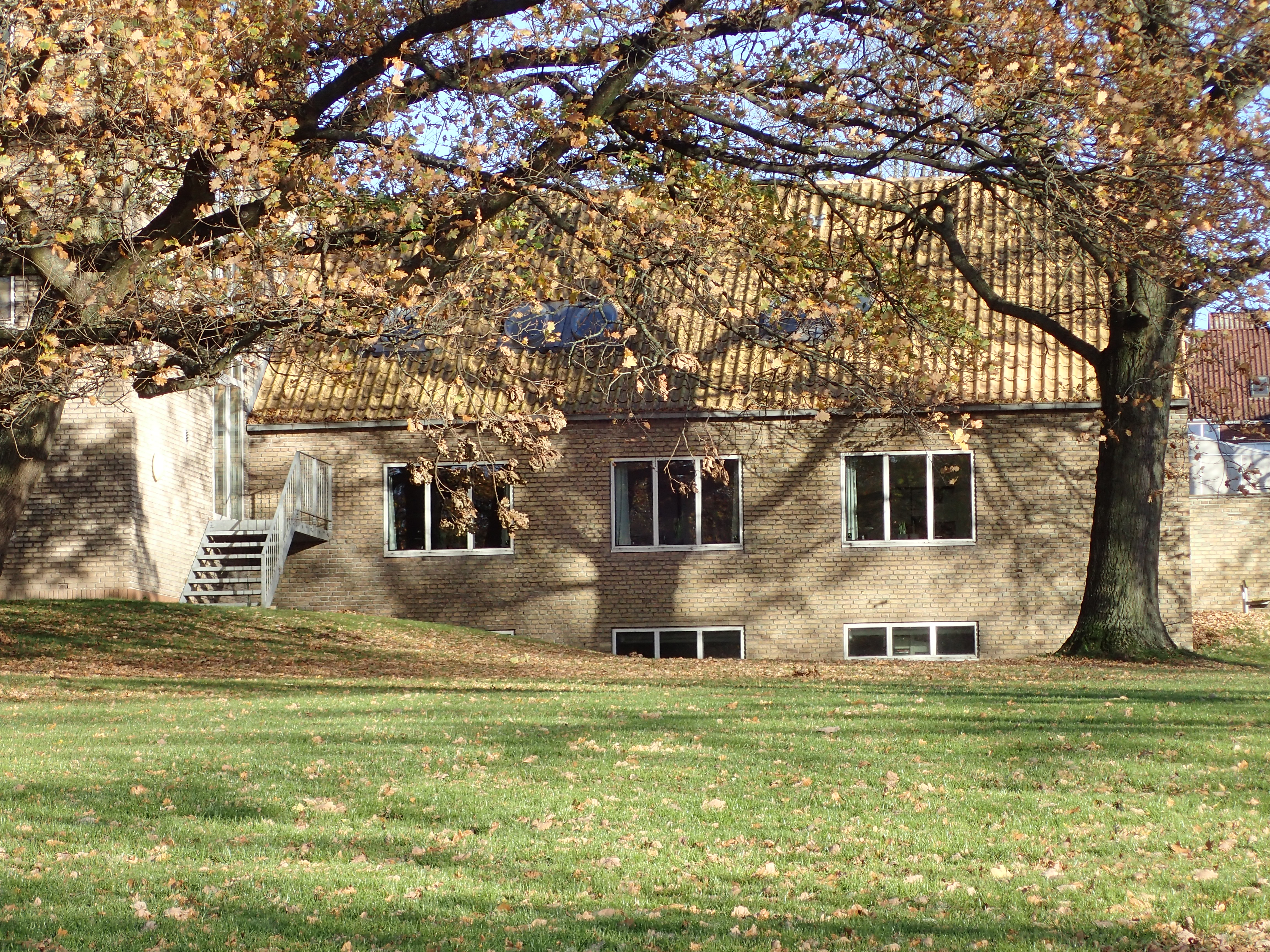 Kollegiekontoret (Bygning 1310). Oprindeligt efor-bolig fra 1952.